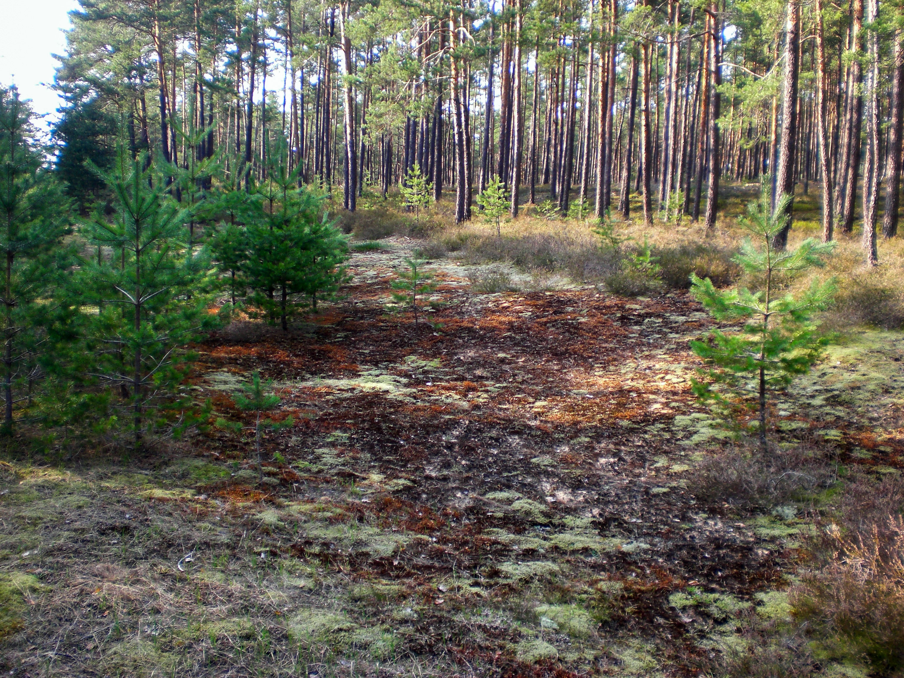 Flechten-Kiefernwälder südlich Leinburg